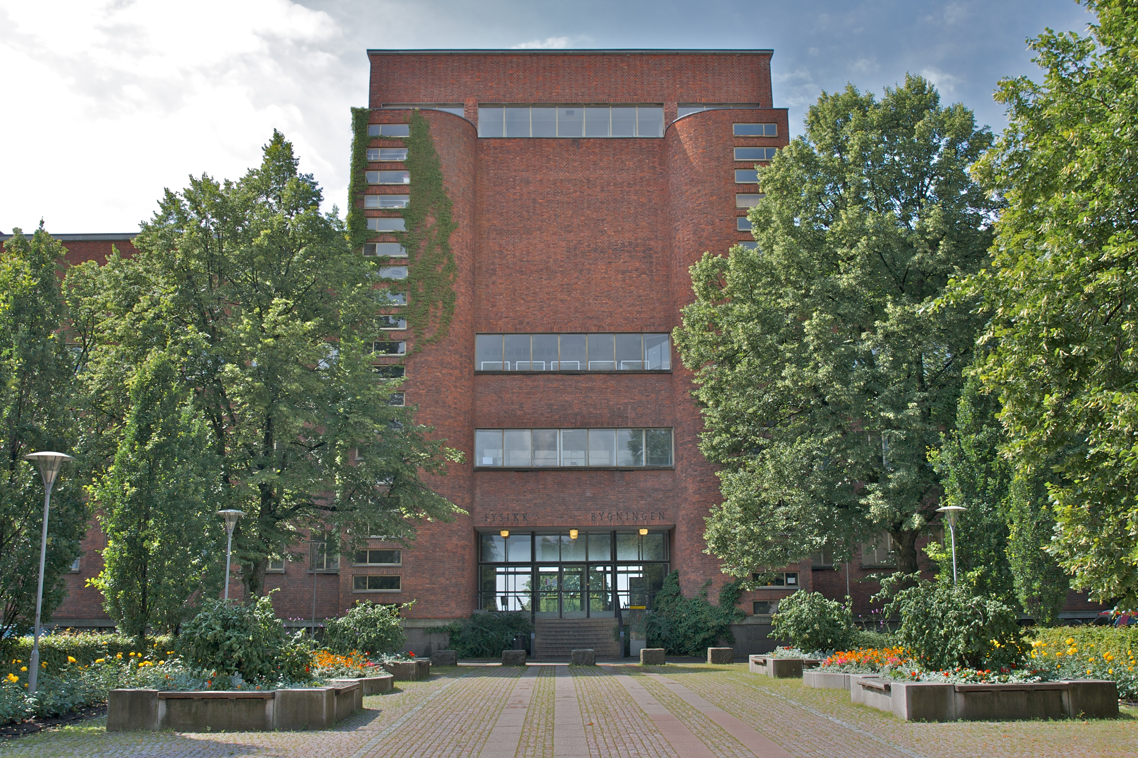 Fysikkbygningen, Universitetet i Oslo.